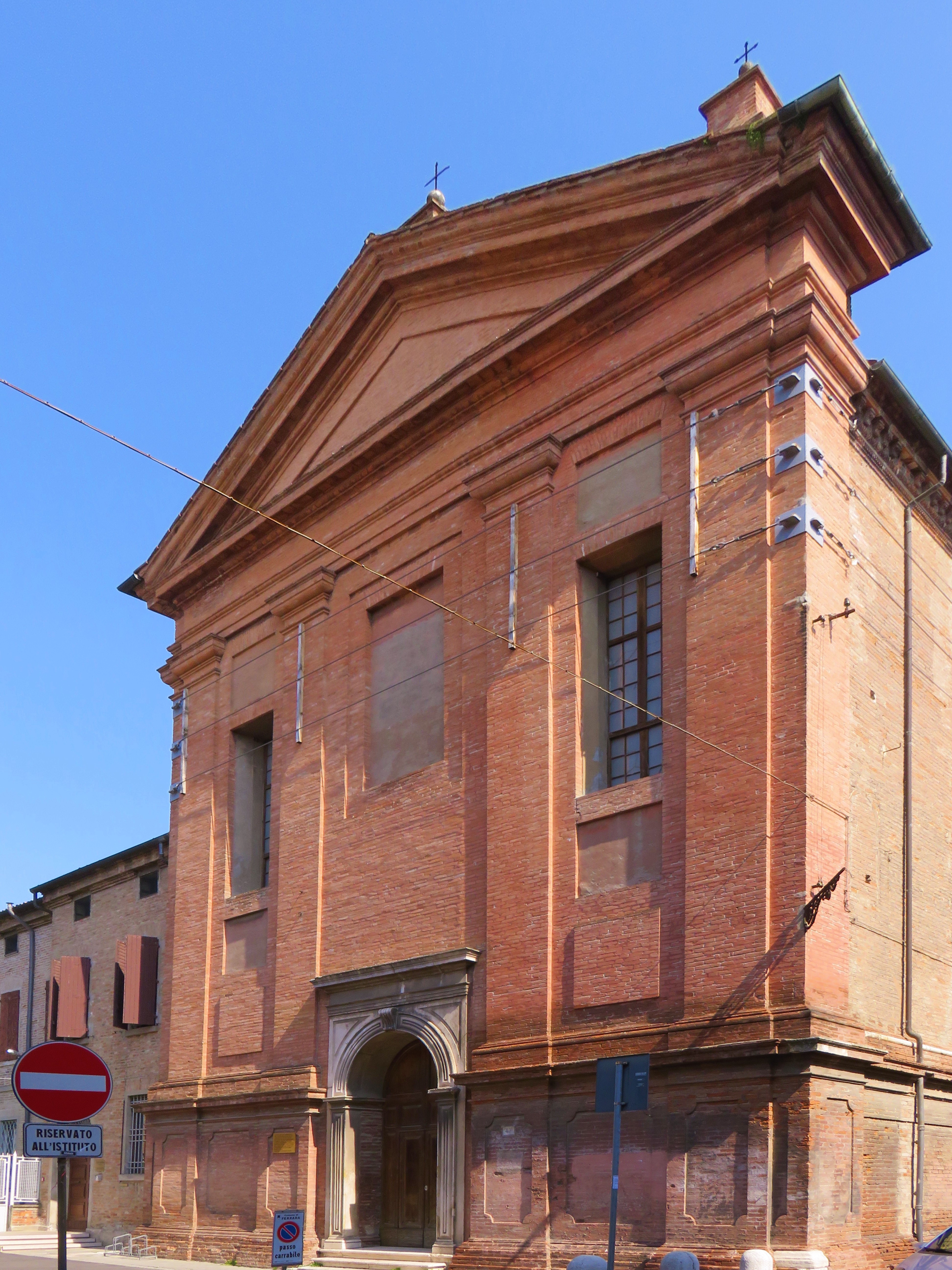 Antica via di Ferrara appartenente ai primi insediamenti urbani